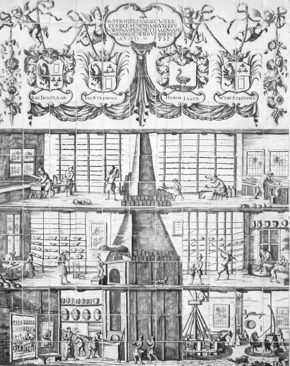 Fliesentableau mit friesischer Fayencetöpferei, datiert auf 1737